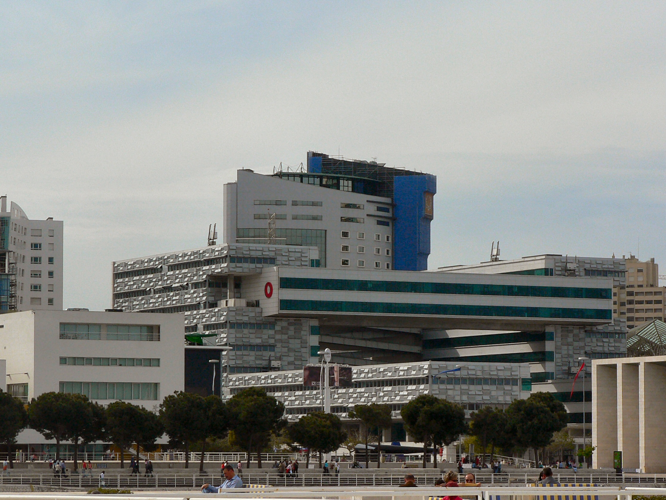 Edifício da Vodafone no Parque das Nações em Lisboa